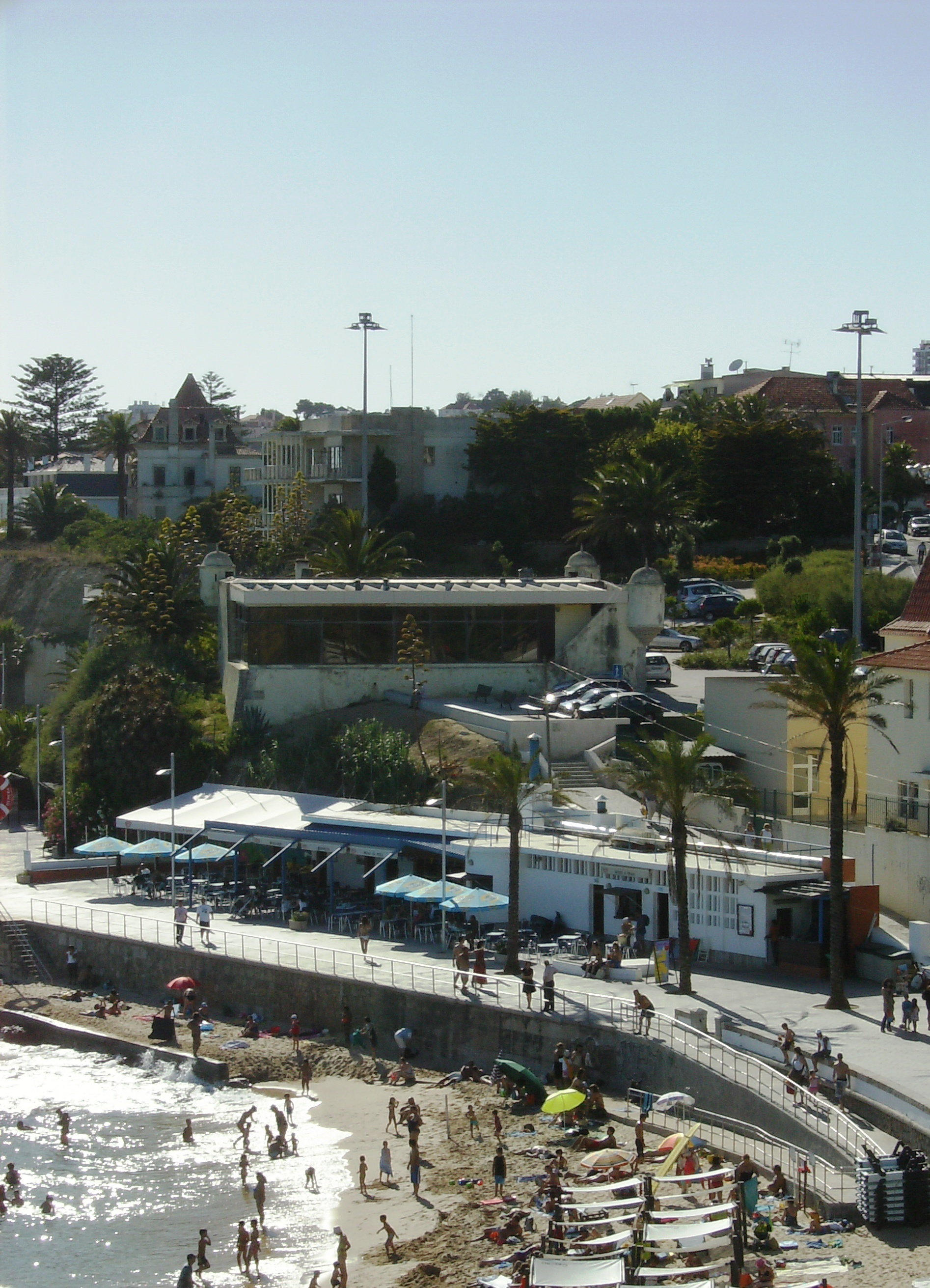 Forte de São Pedro do Estoril, Estoril, Cascais, distrito de Lisboa, Portugal.